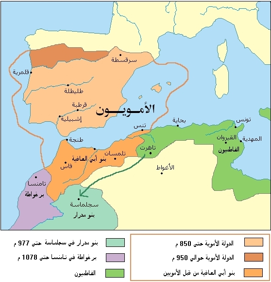 الدولة الأموية في الأندلس والمغرب الأقصى